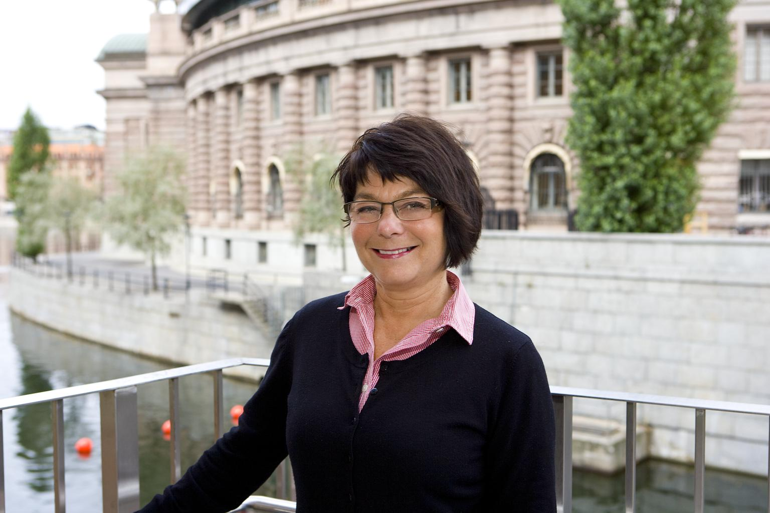 zander_solveig_02